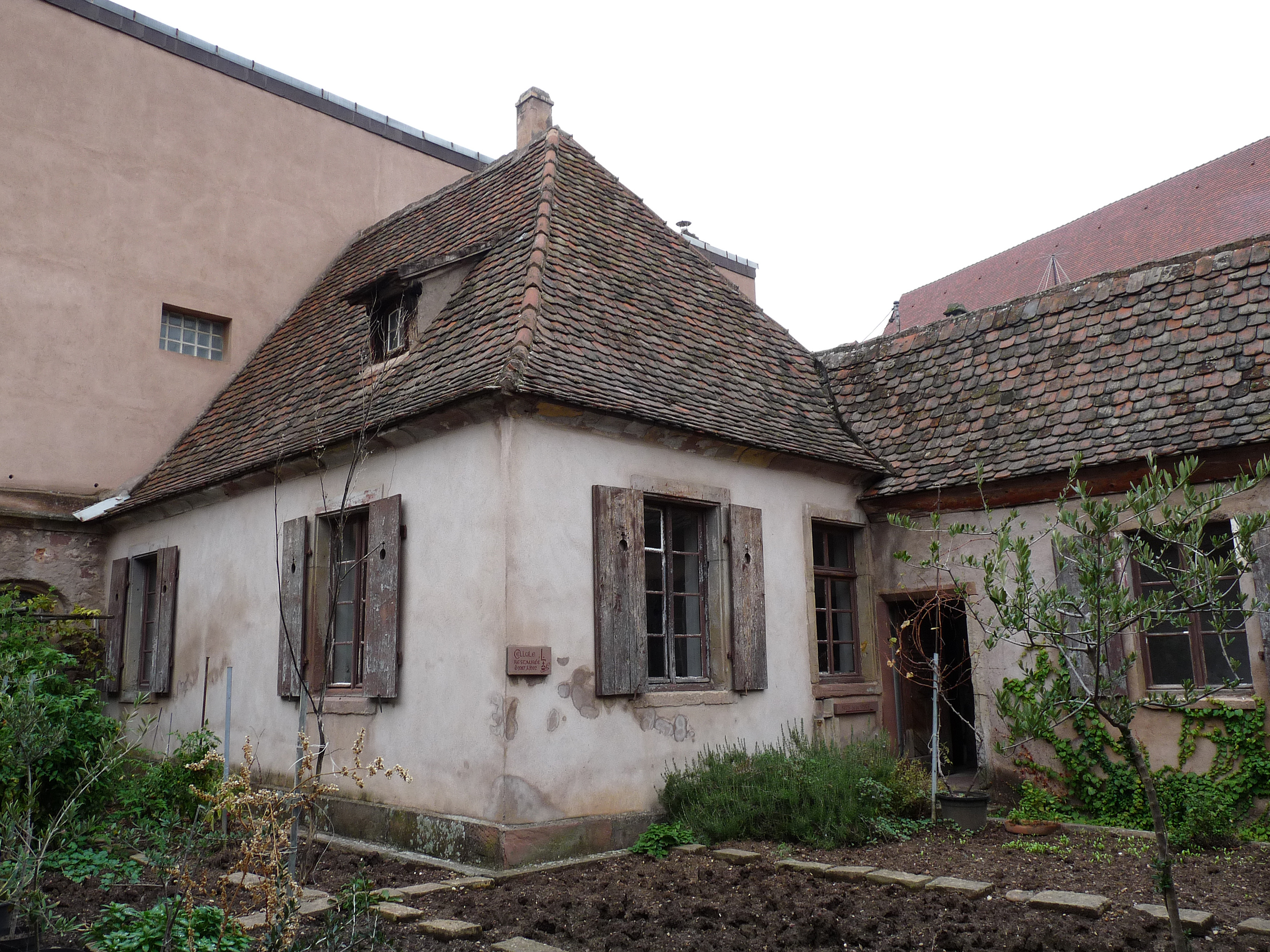 Chartreuse de Molsheim (Bas-Rhin)